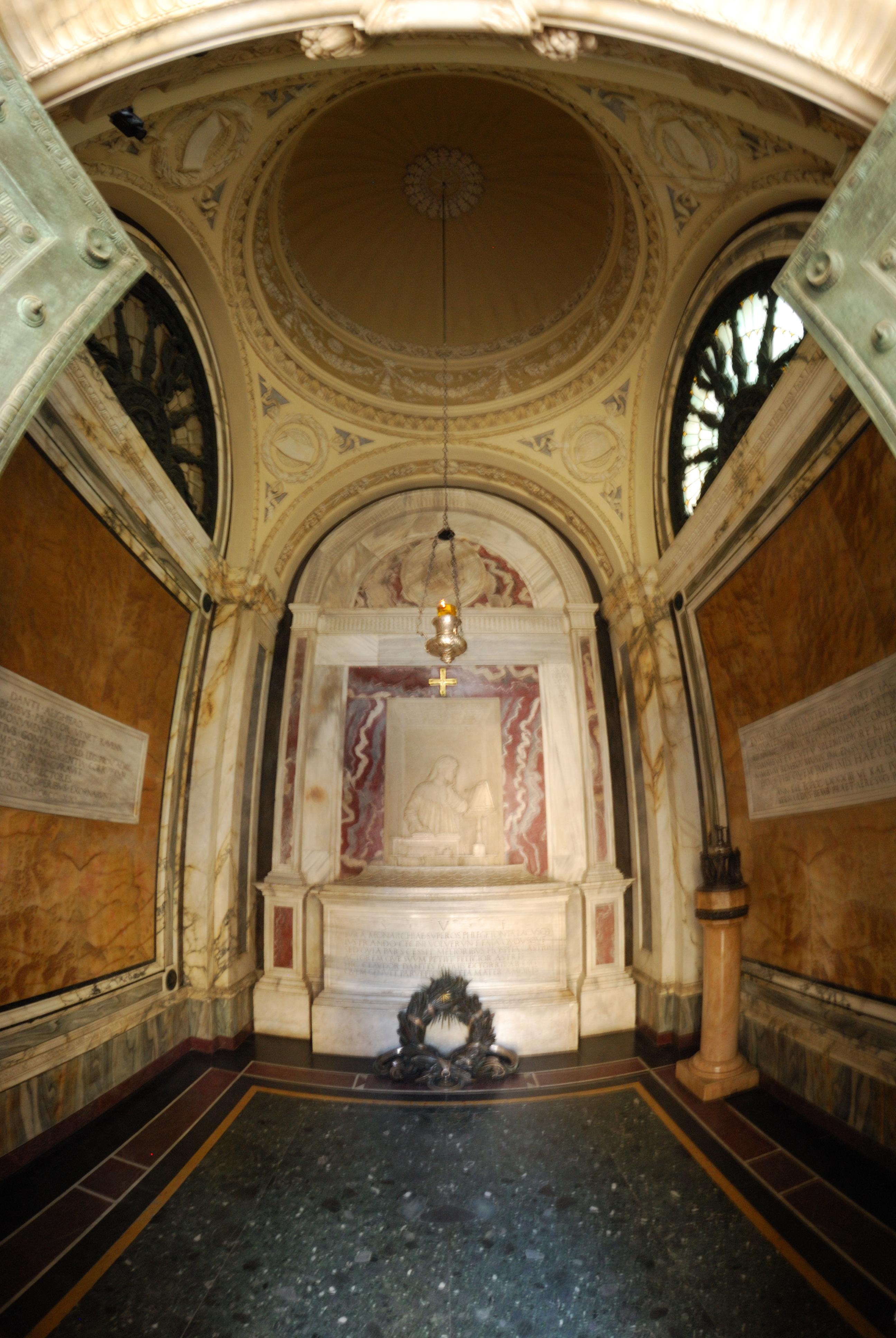 Zona Dantesca e Tomba di Dante This is a photo of a monument which is part of cultural heritage of Italy.